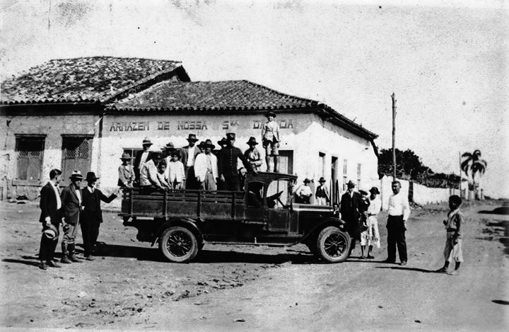 Itaquaquecetuba por volta de 1928, distrito de Mogi das Cruzes. Armazém de Nossa senhora da Ajuda, esquina do Largo da Matriz com a rua capitão José Leite